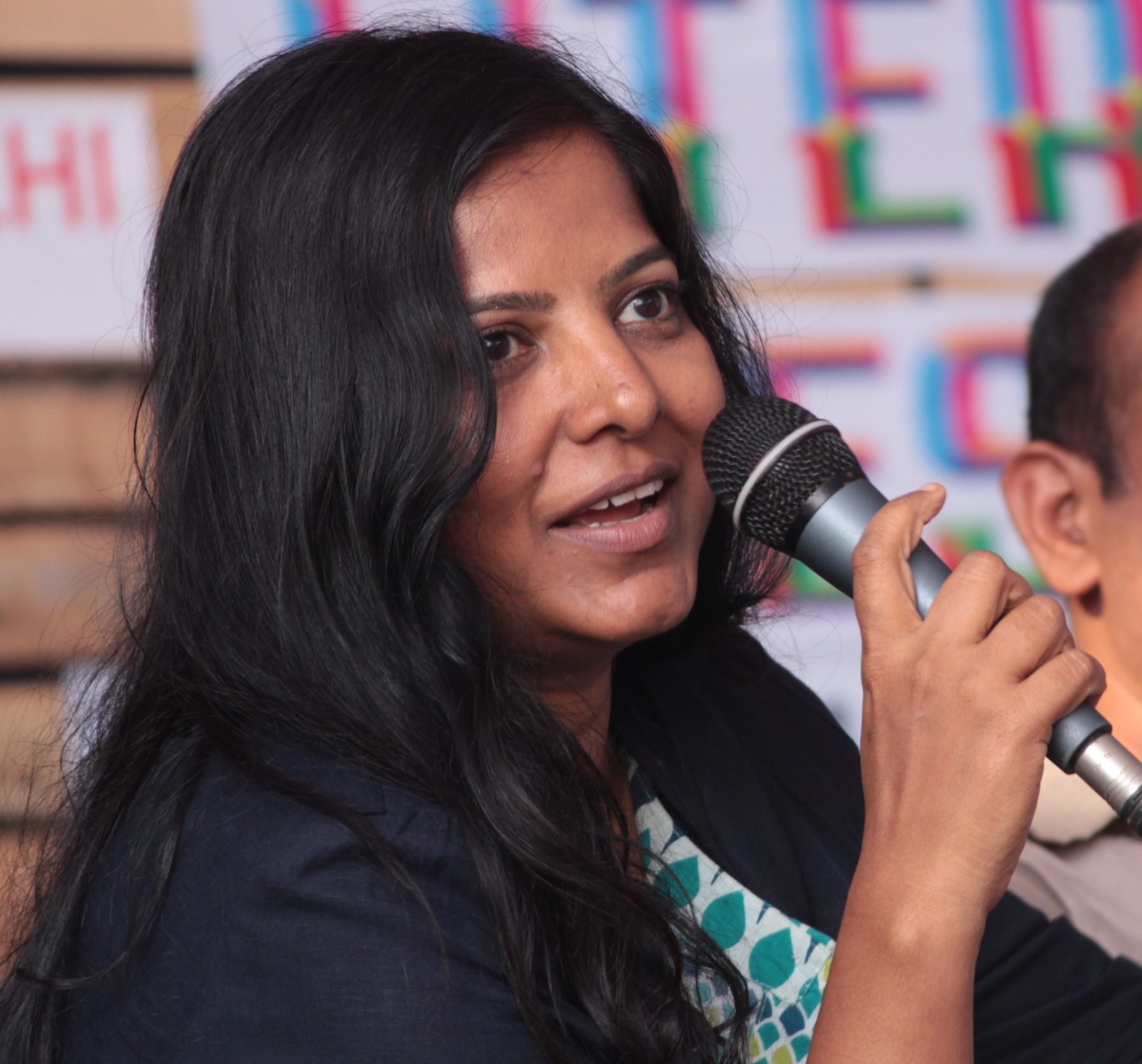 ലീനാ മണിമേഖല കോഴിക്കോട് ലിറ്ററേച്ചര്‍ ഫെസ്റ്റിവലില്‍ (2017 ഫെബ്രുവരി 3